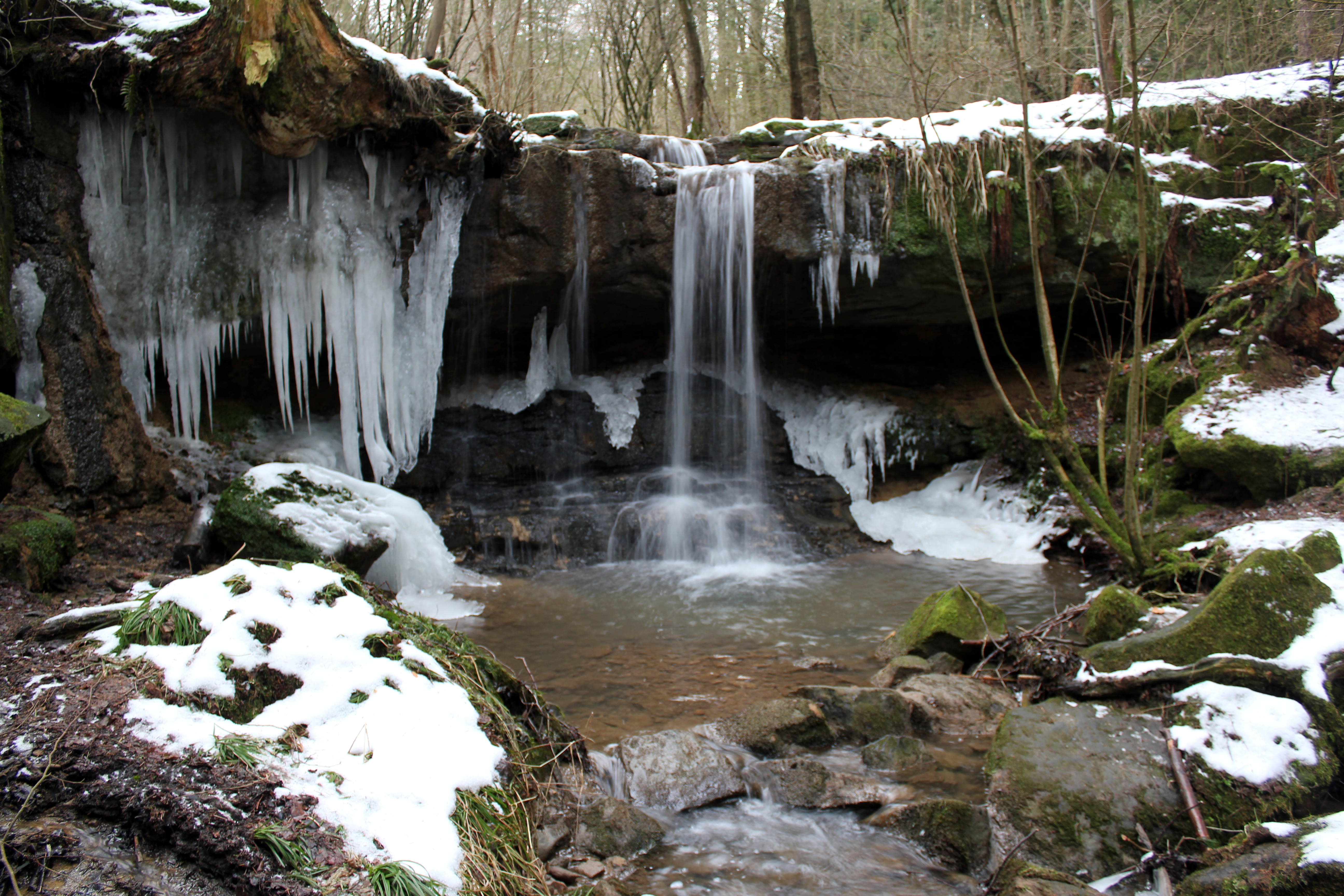 Der Pfersag Wasserfall bei Ebneth im Februar 2011